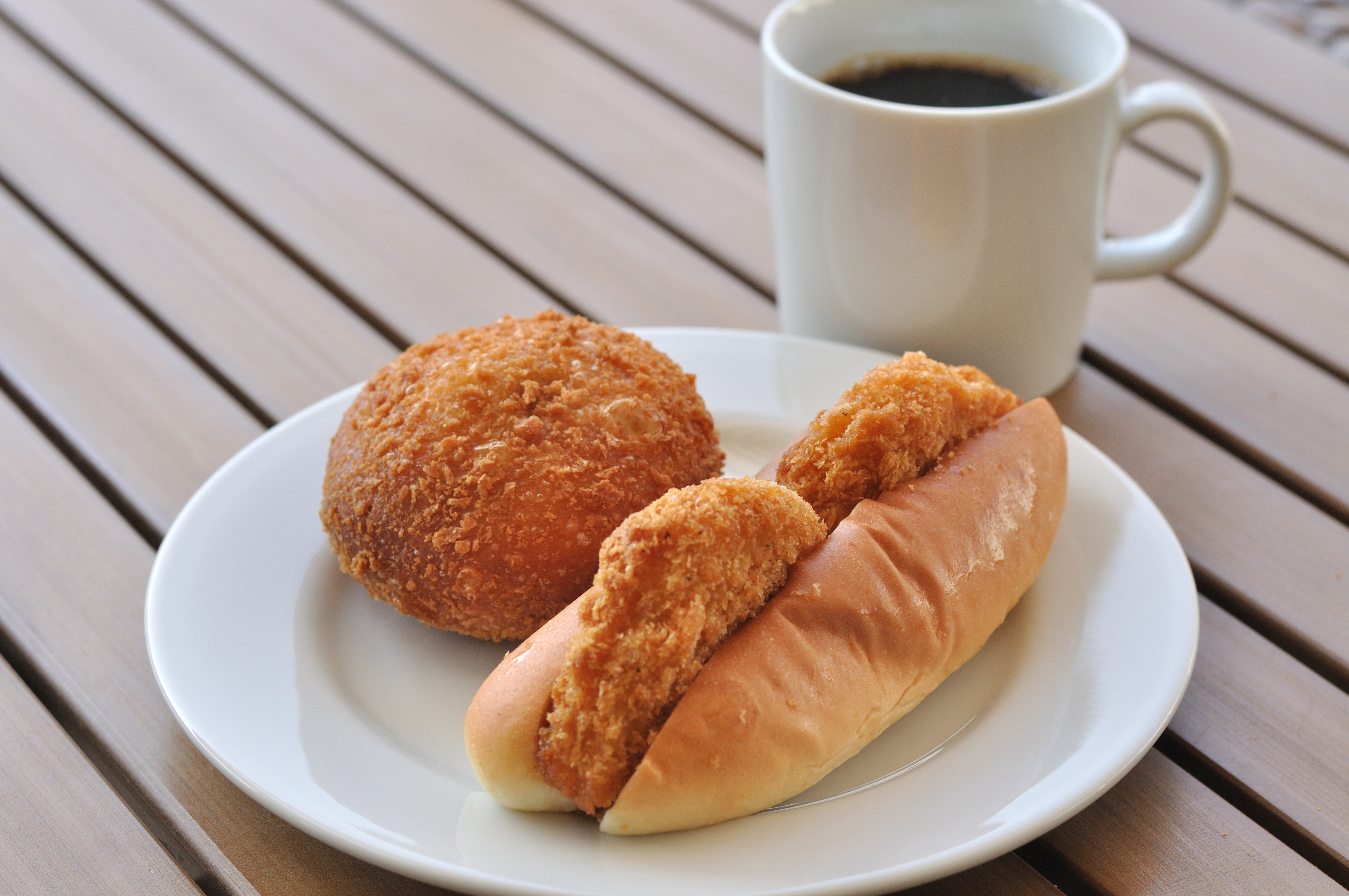 鎌倉「日進堂」のコロッケパンと辛口カレーパン